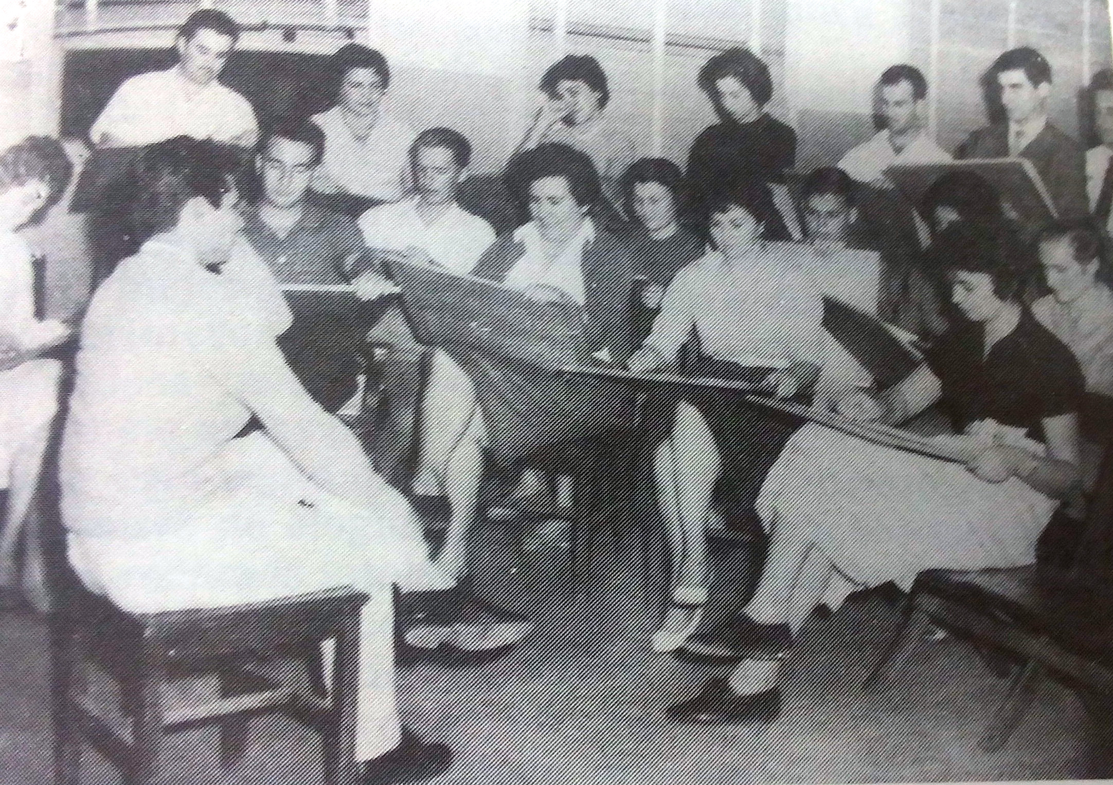 Alumnos de la antigua Escuela de Artes en 1962, precursora de la actual Facultad de Artes de la Universidad Nacional de Misiones (UNaM) en Oberá.